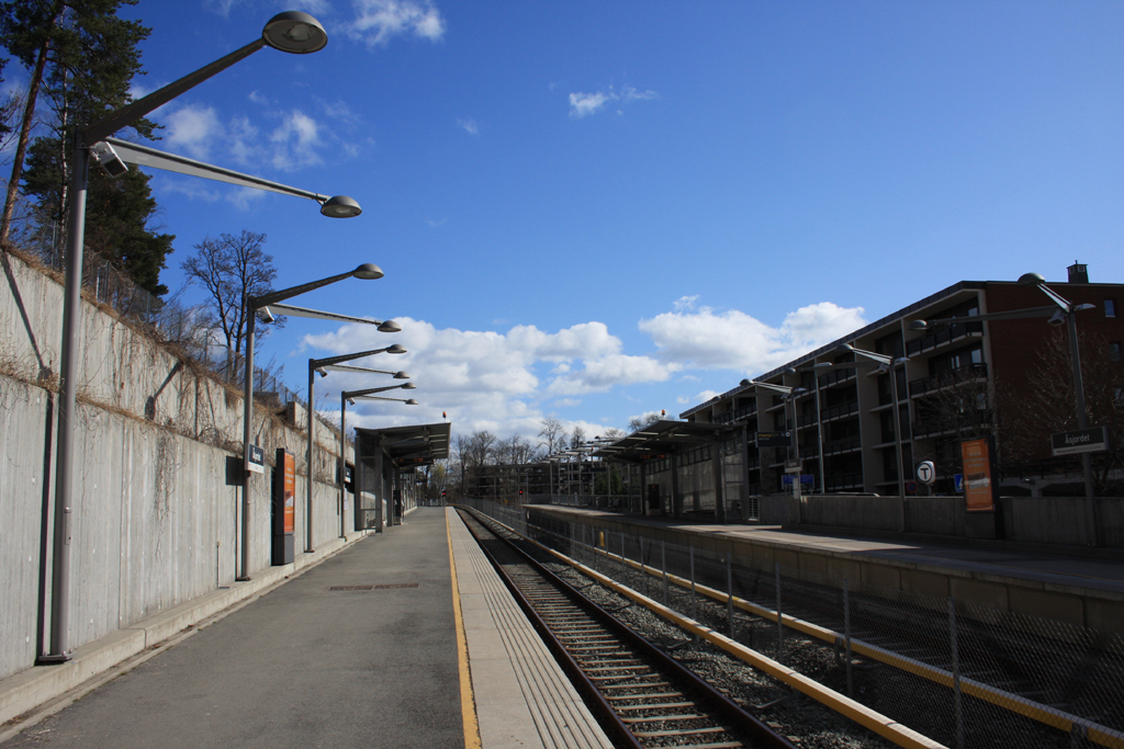 Åsjordet T-banestasjon fra Spor 2 mot Avløs. Bilderetningen er dog mot Ullernåsen.